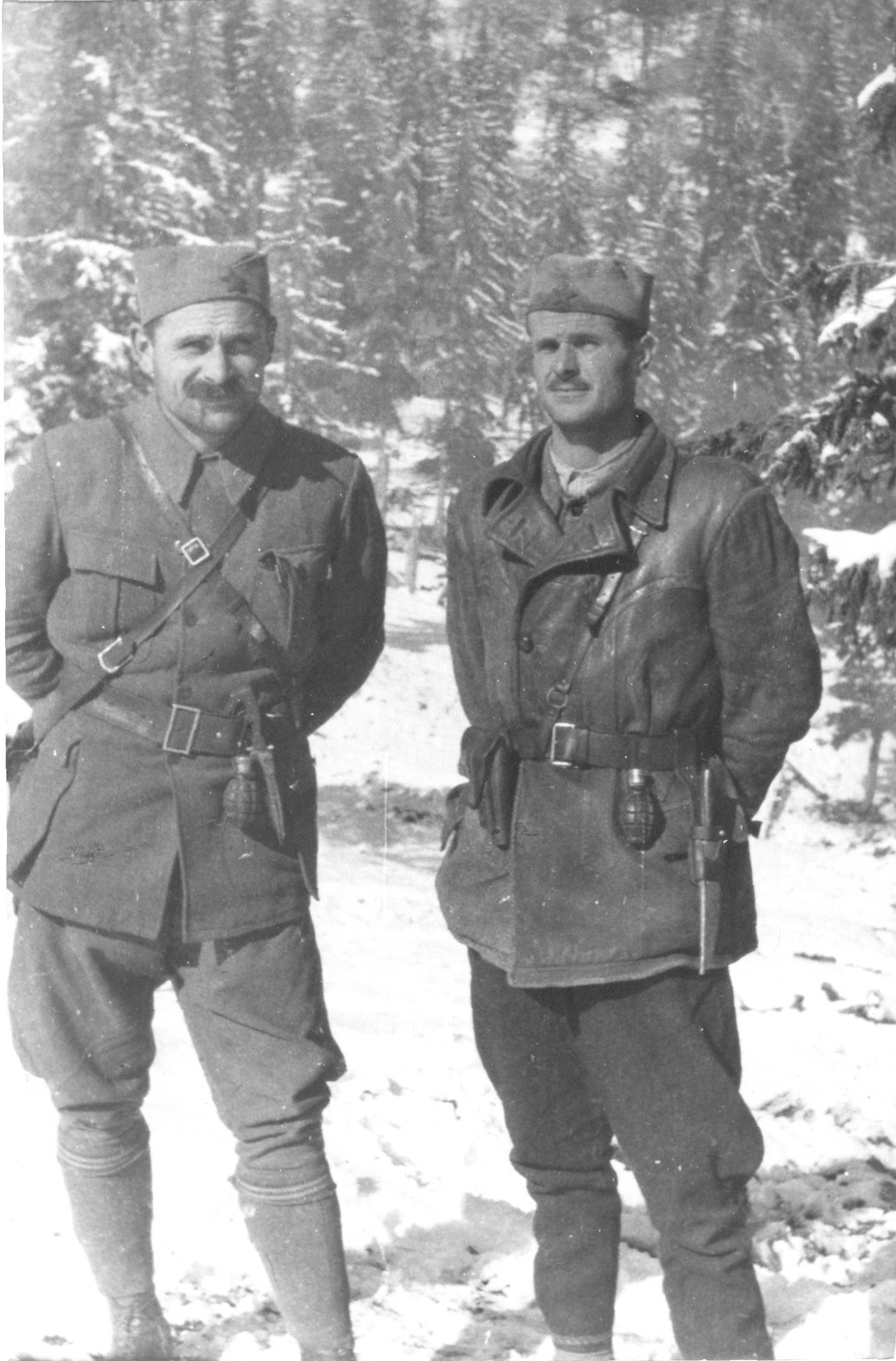 Srpskohrvatski / српскохрватски: Narodni heroj Sava Kovačević i Vojin Popović (Petar Božović), 1942.